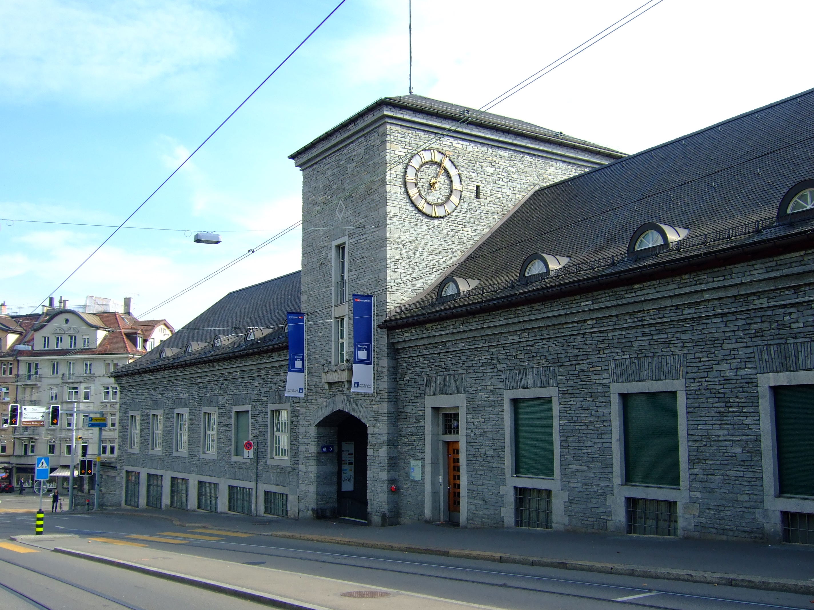 Der Bahnhof Enge von der Bederstrasse aus gesehen